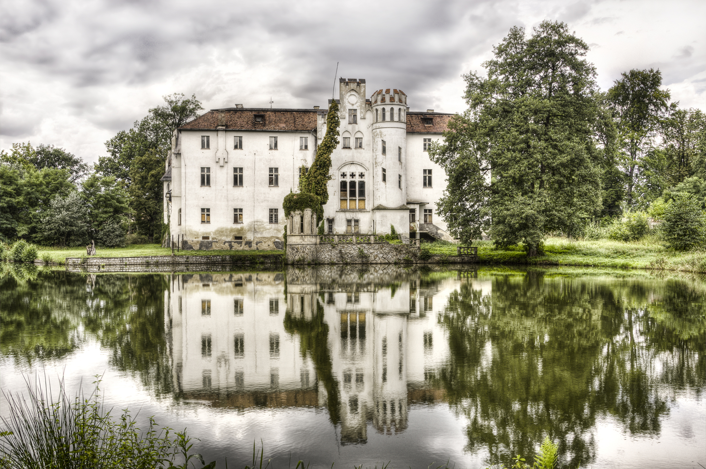 pałac Dobrocin, Dzierżoniów